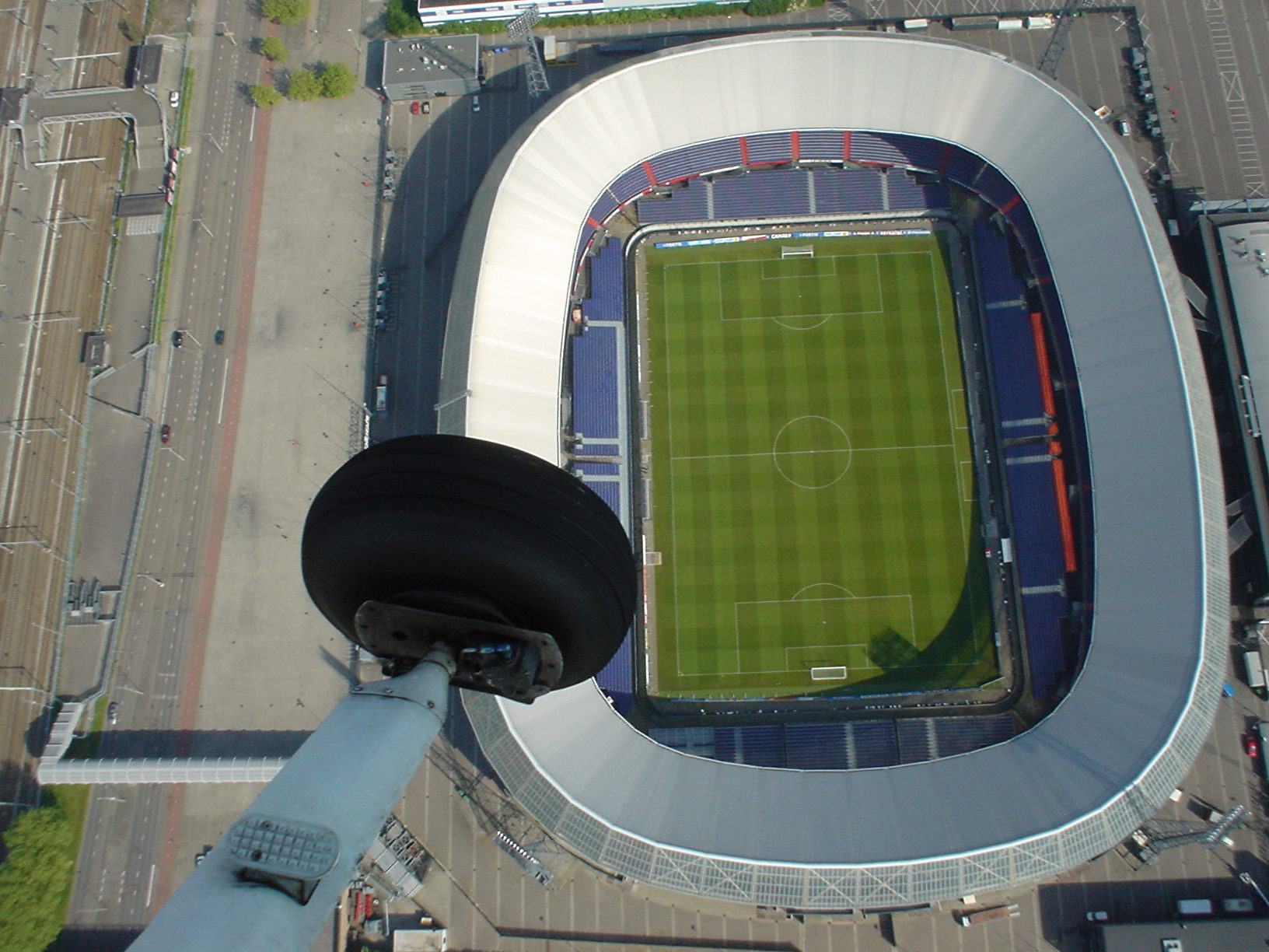 De Kuip Rotterdam, The Netherlands